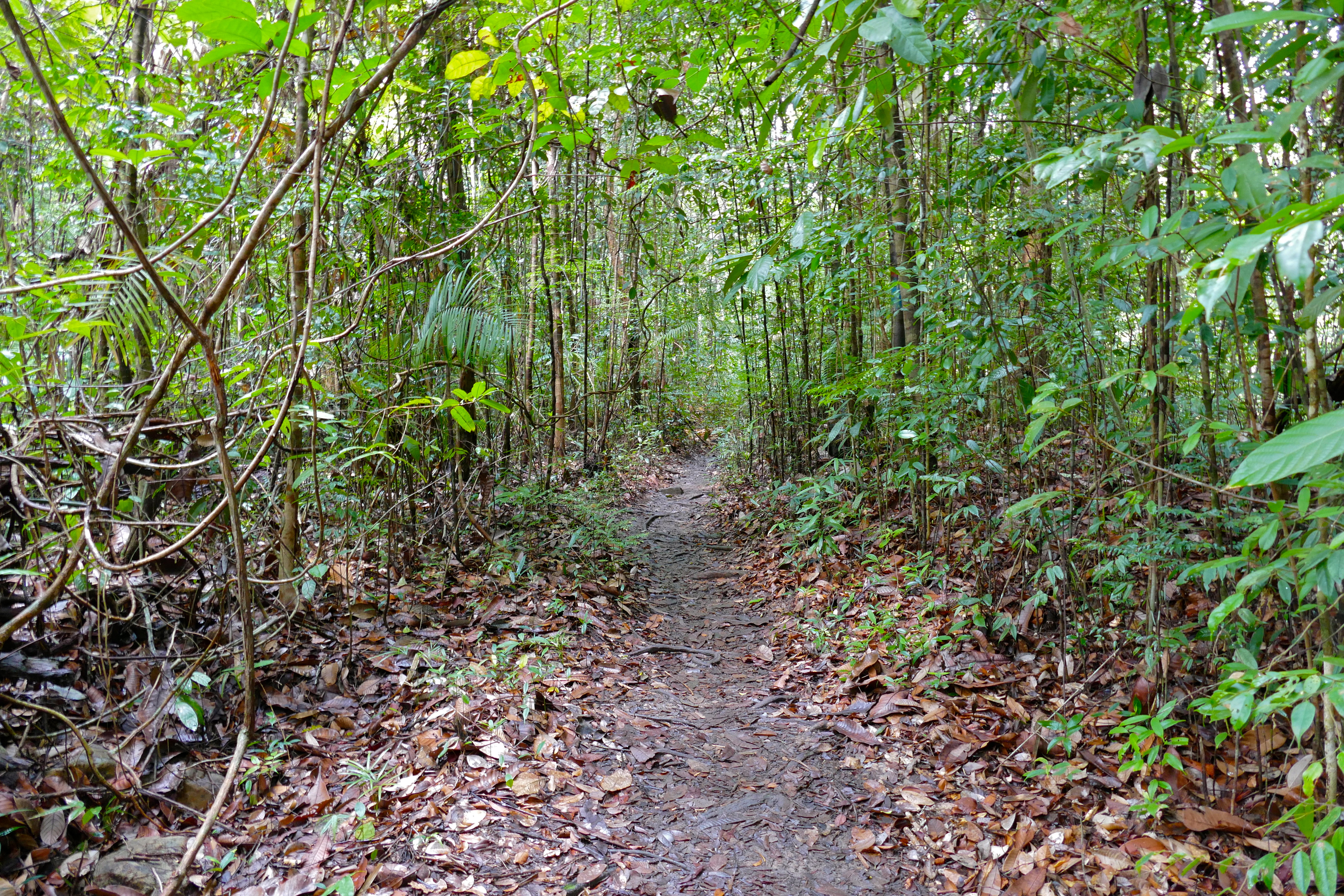 Gunung Santubong NP, North of Kuching, Sarawak, MALAYSIA